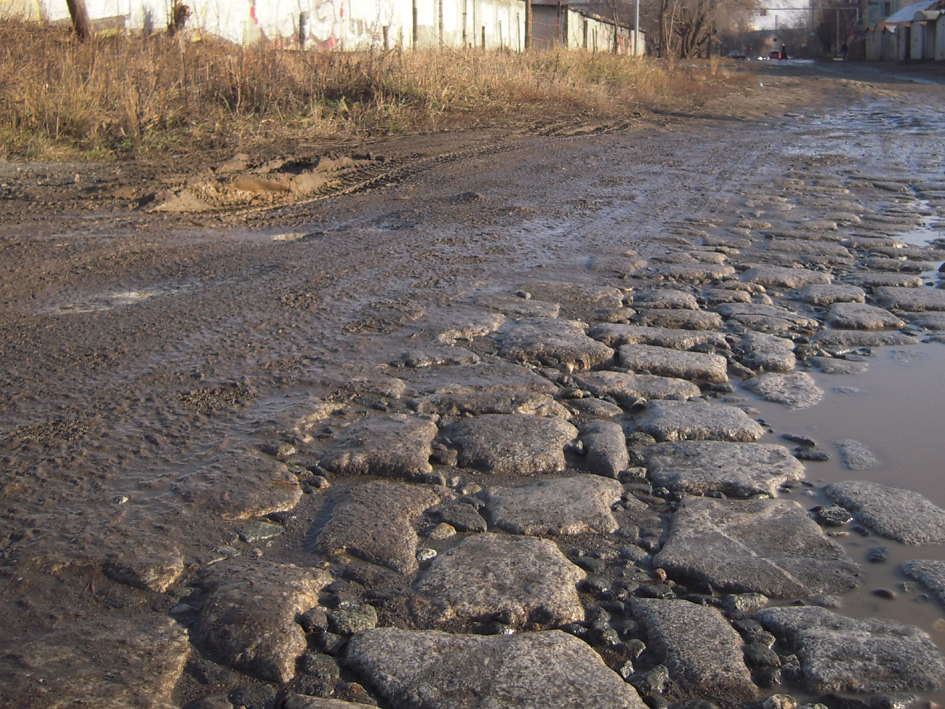 Танкодром завода Уралмаш Южная петля